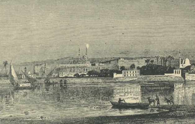 رسم لمدينة الفُسطاط، عاصمة مصر الإسلاميَّة القديمة.